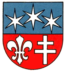 Wappen von Ergisch